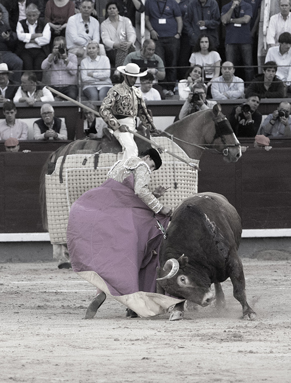 Remate de media verónica de Fortes en la plaza de toros de Las Ventas. Solo color en el capote